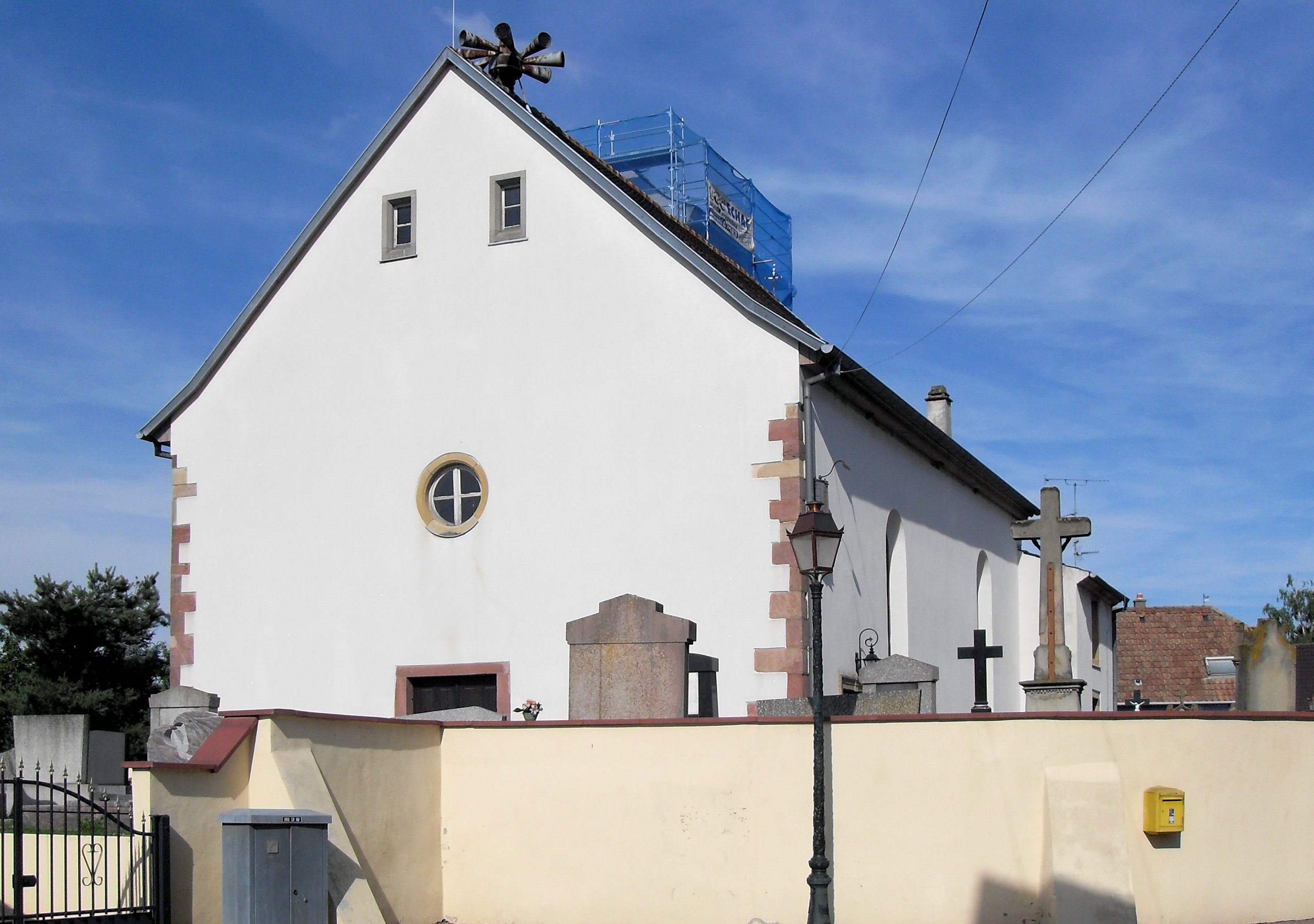 L'église Saint-Arbogast à Munwiller